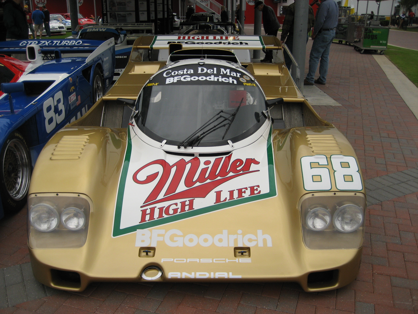 Holbert Racing's Porsche 962 chassis #HR7.